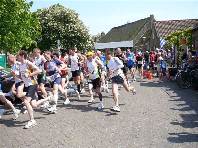 Start van de meidoornloop 2009 in Nisse (Nederland) Start of the meidoornloop 2009 in Nisse (The Netherlands)